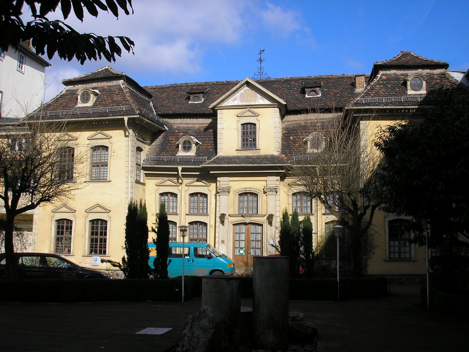 Das Barockschloss hinter dem Haus zum Breiten Herd (Innenhof) am Fischmarkt in Erfurt (Thüringen).